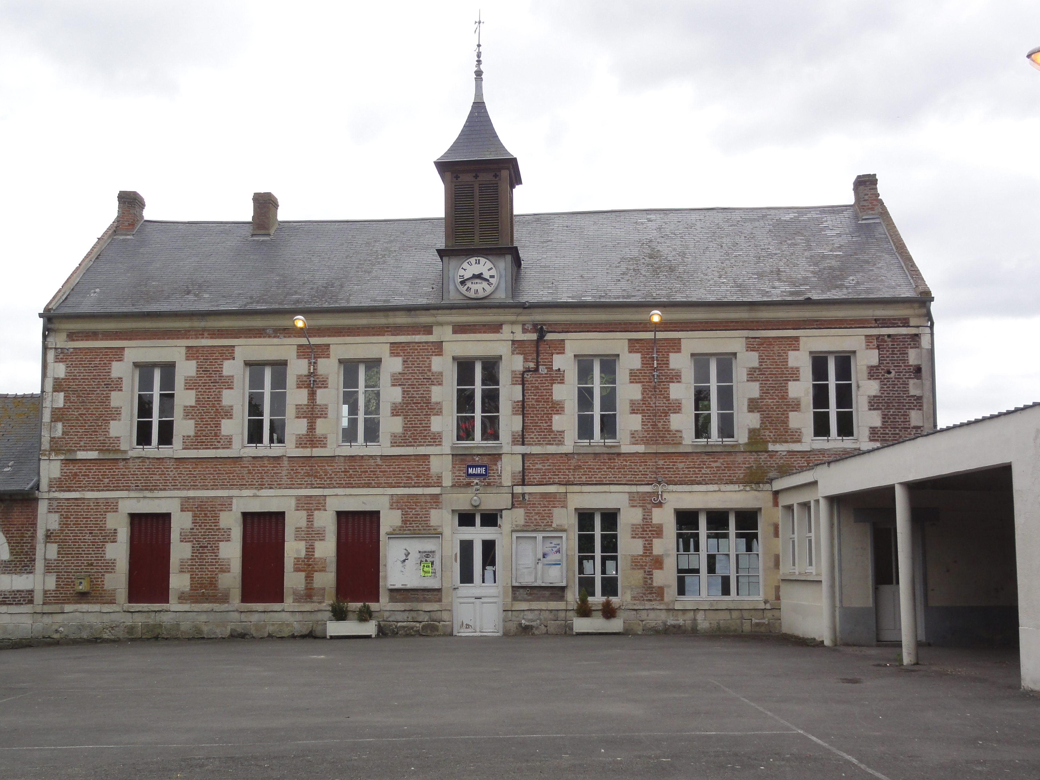 Grandlup-et-Fay (Aisne) mairie